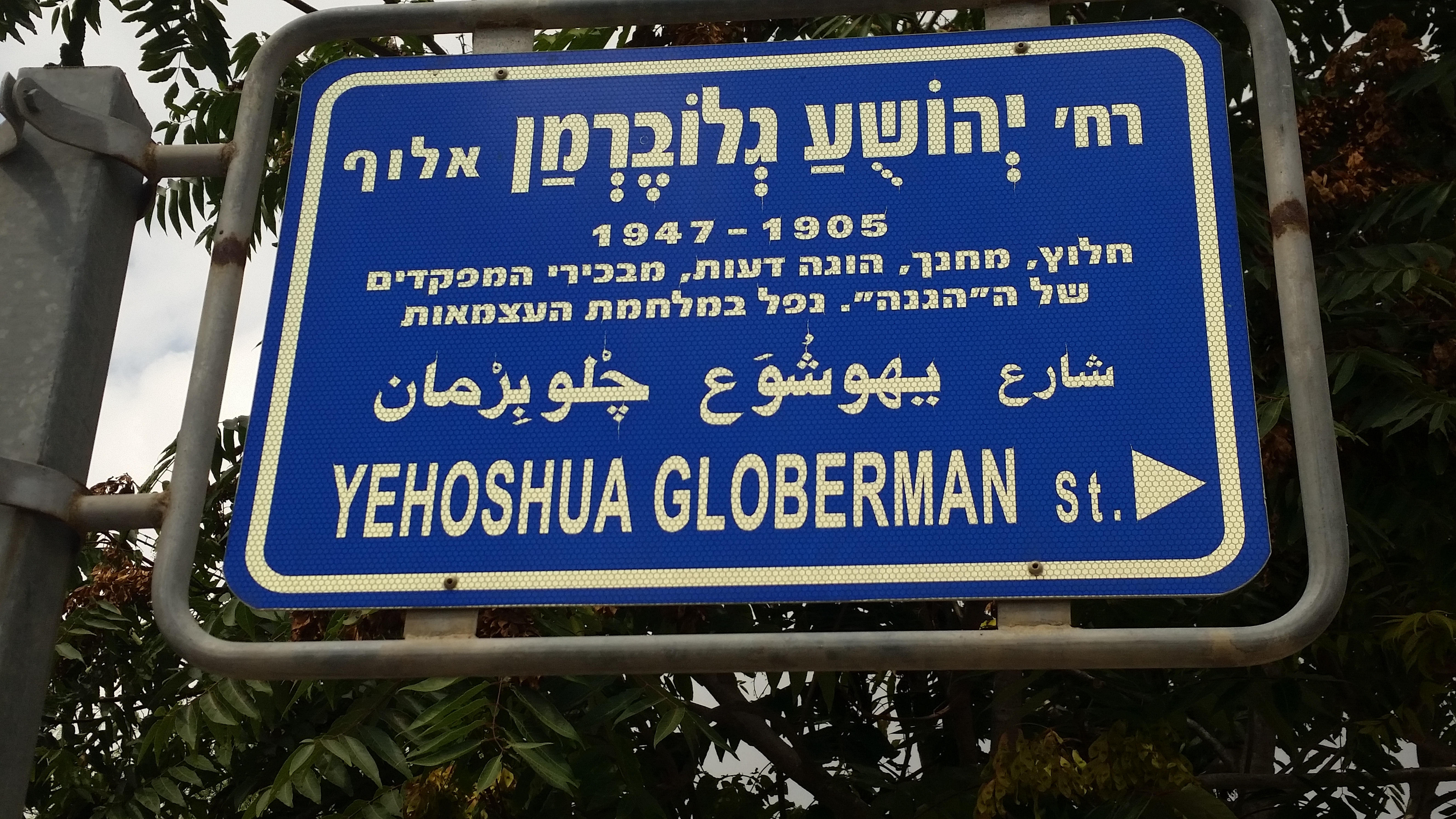 שלט רחוב על שמו של אלוף יהושע גלוברמן בשכונת סביוני דניה בחיפה